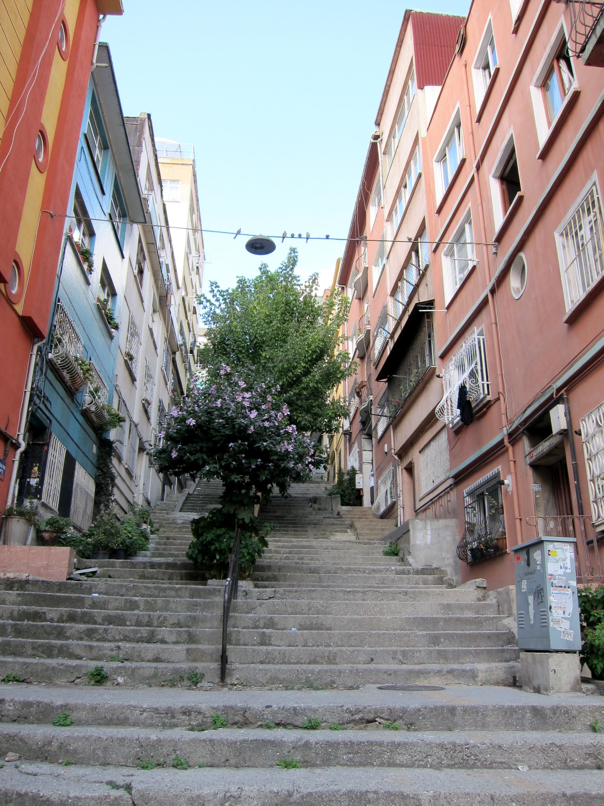 stairs